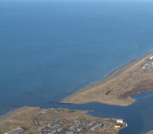 протока Рудановского - вид сверху. с. Красногорск Сахалинской области.